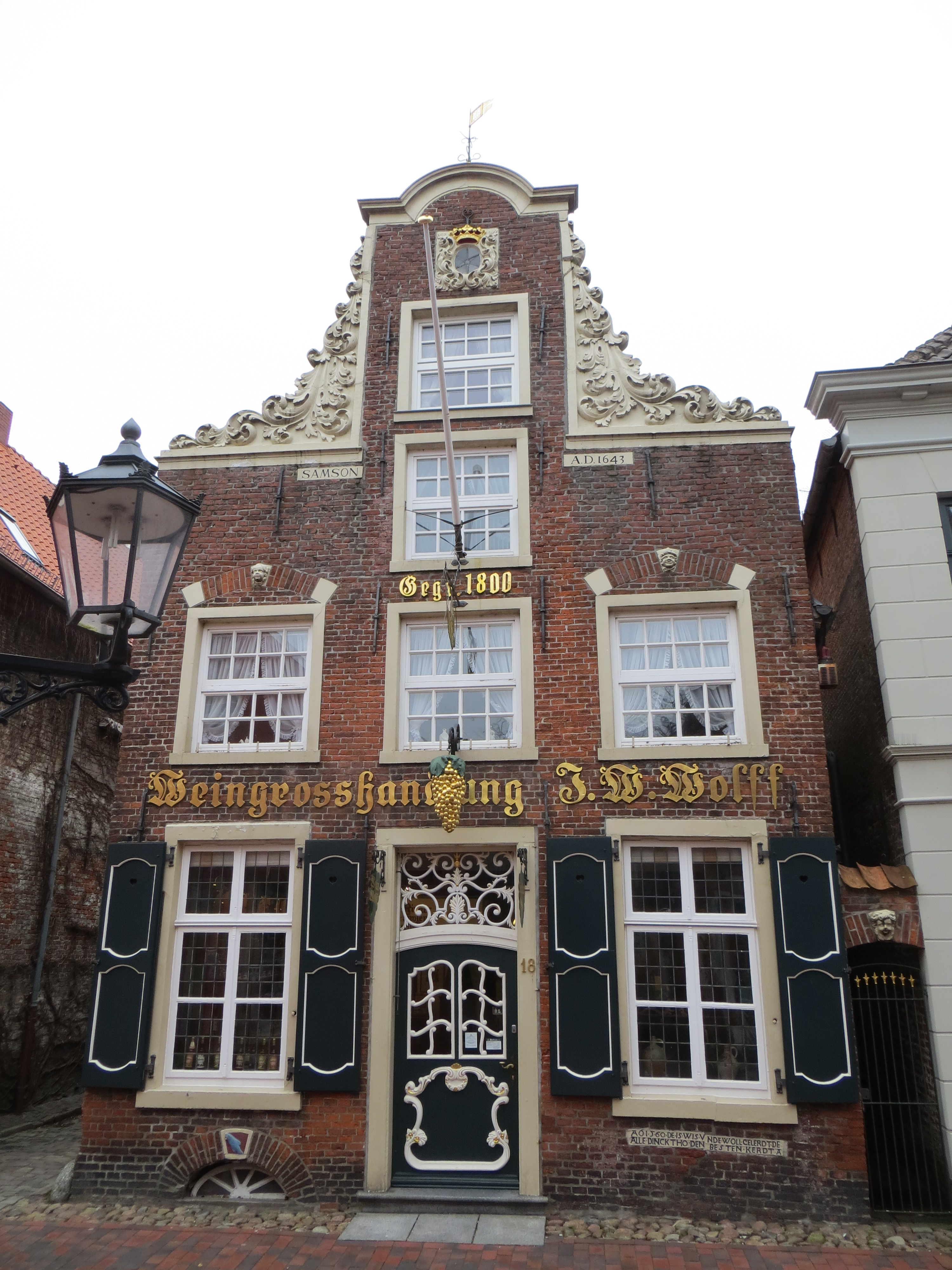 Gebouwen in de oude binnenstad van Leer (Oost Friesland)